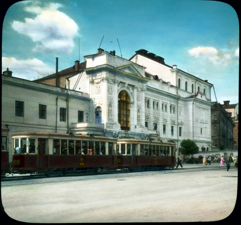 2-й МХАТ (Центральный детский театр)